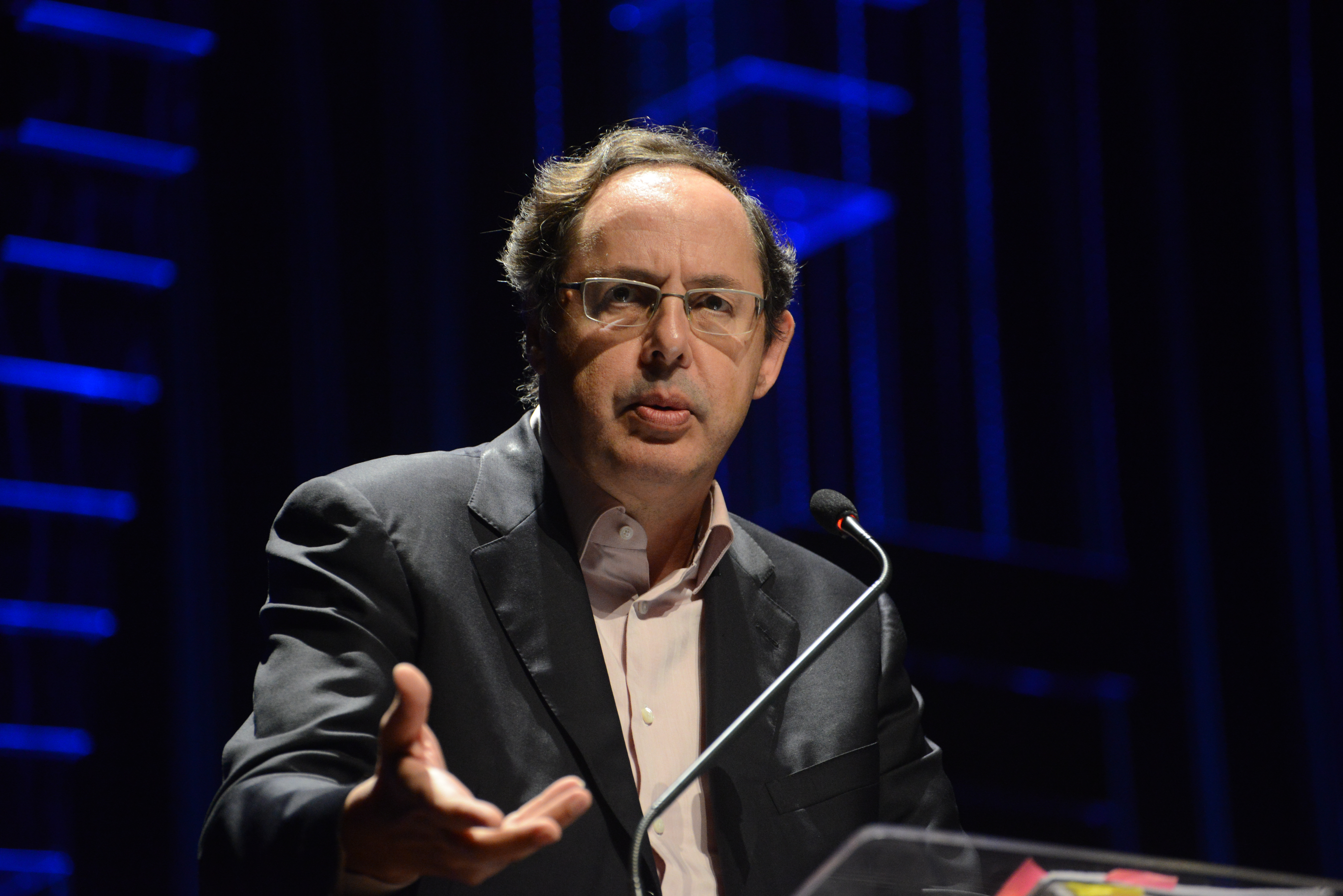 Convidados: Gilles Lipovetsky, filósofo francês, e Eduardo Giannetti, economista brasileiro Data: 5 de junho de 2017 Local: Salão de Atos da UFRGS Crédito das imagens: Fronteiras do Pensamento / Luiz Munhoz